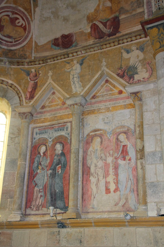 Eglise de Chateloy (Allier) fresques